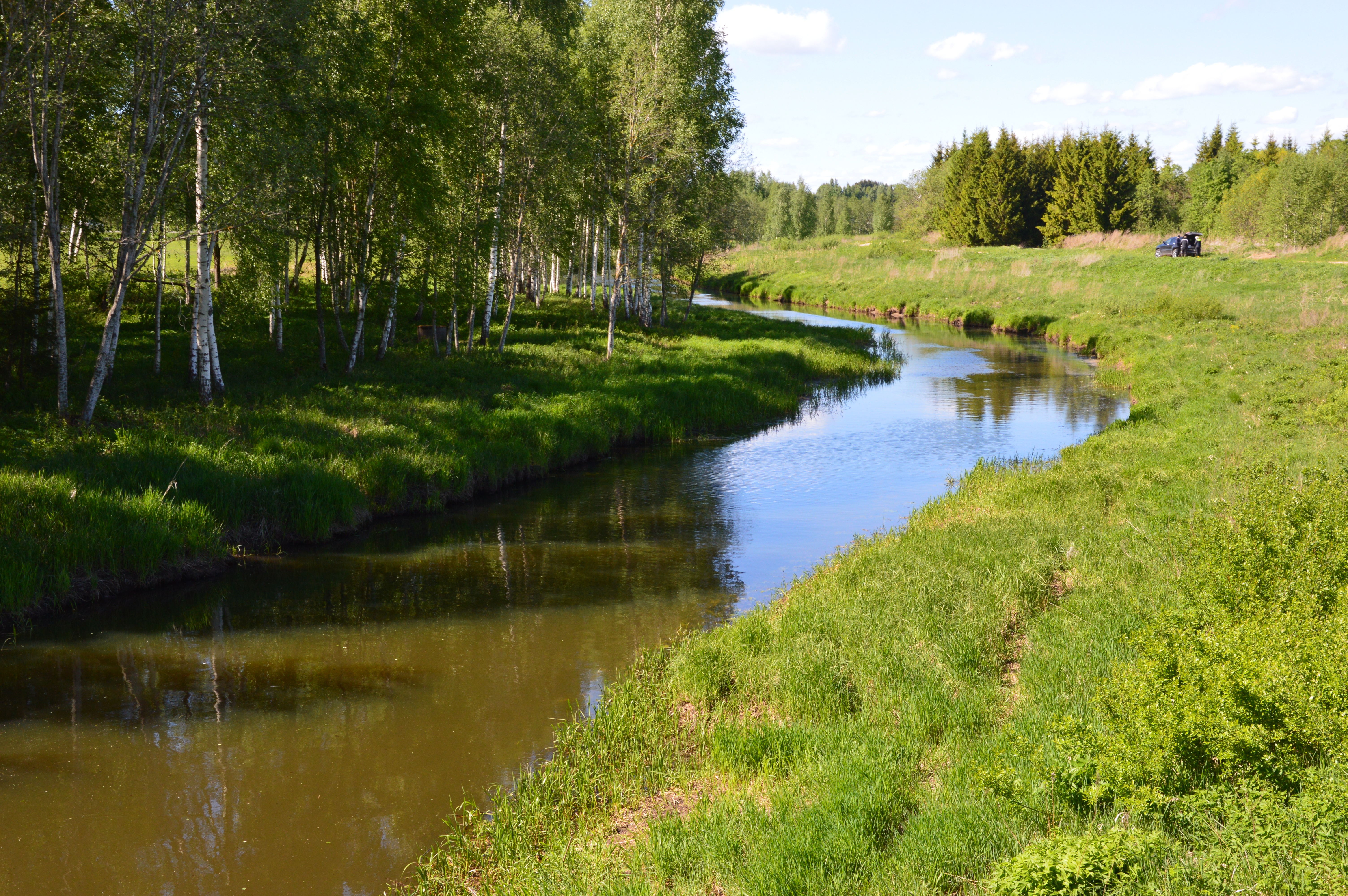 Porijõgi Ülenurme kagunurgas.